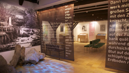 Eingangsbereich des Strindbergmuseums in Saxen